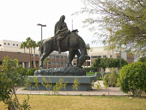 Pioneros